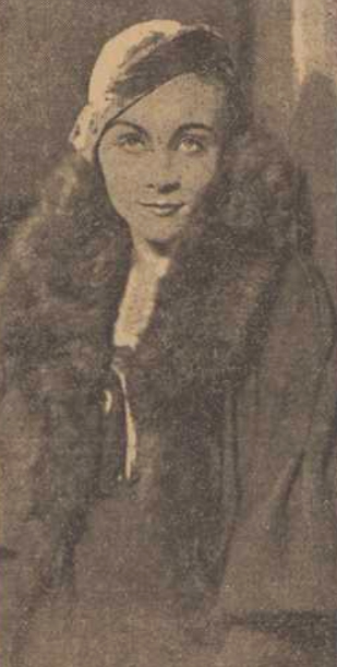 Karin Kavli i Mannen och hans omoral.